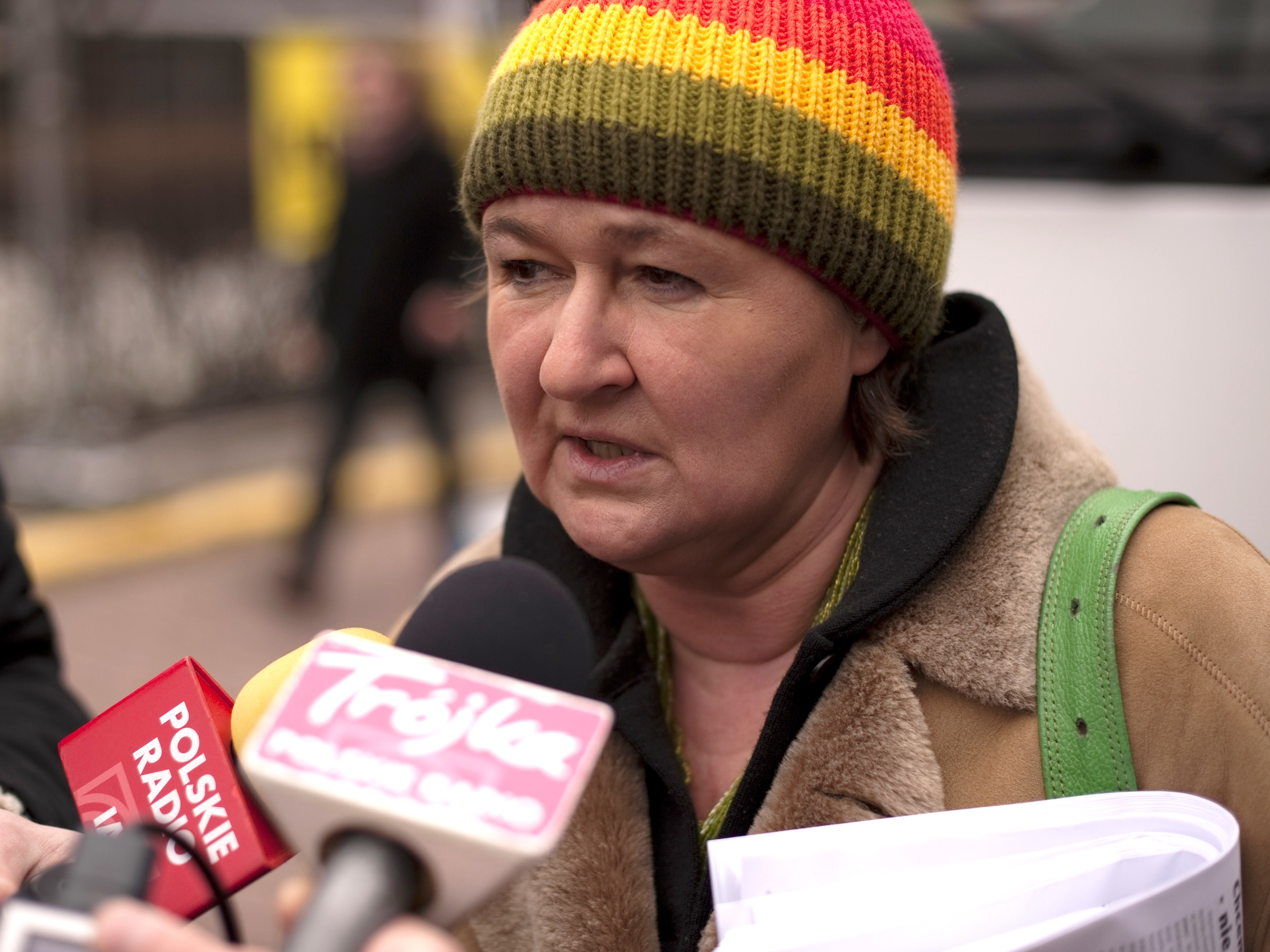 Magdalena Środa na Manifie w Warszawie, w 2009.